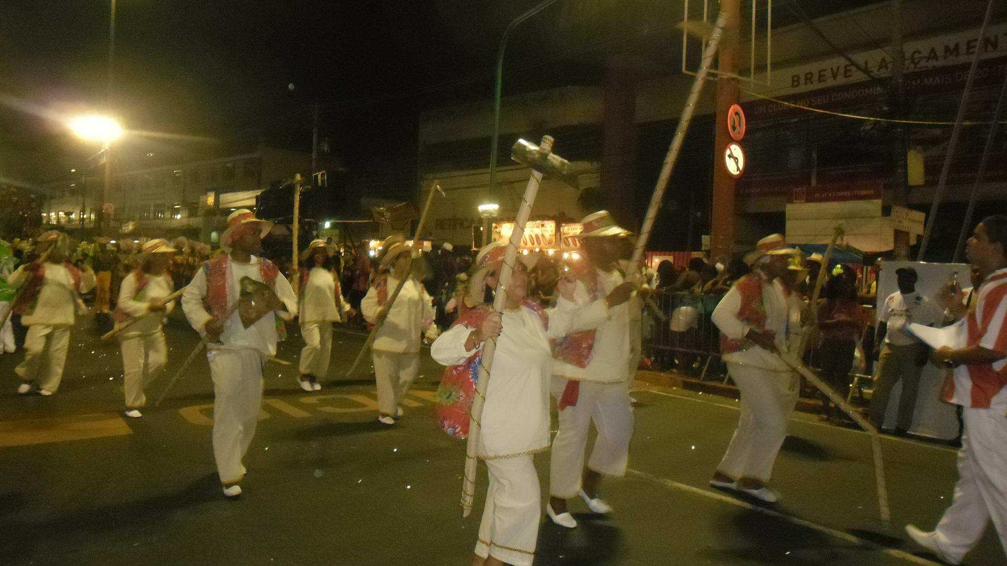 GRES Mocidade de Vicente de Carvalho